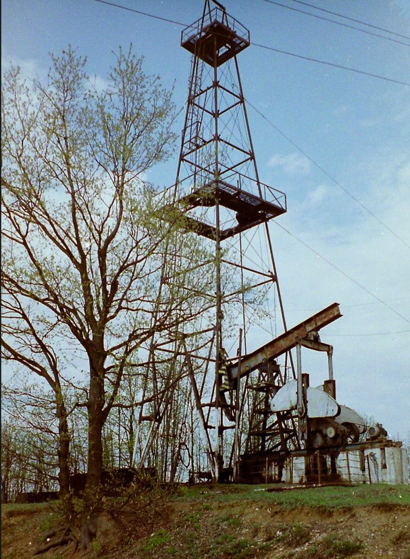 Țicleni Région de Județul Gorj.- România.